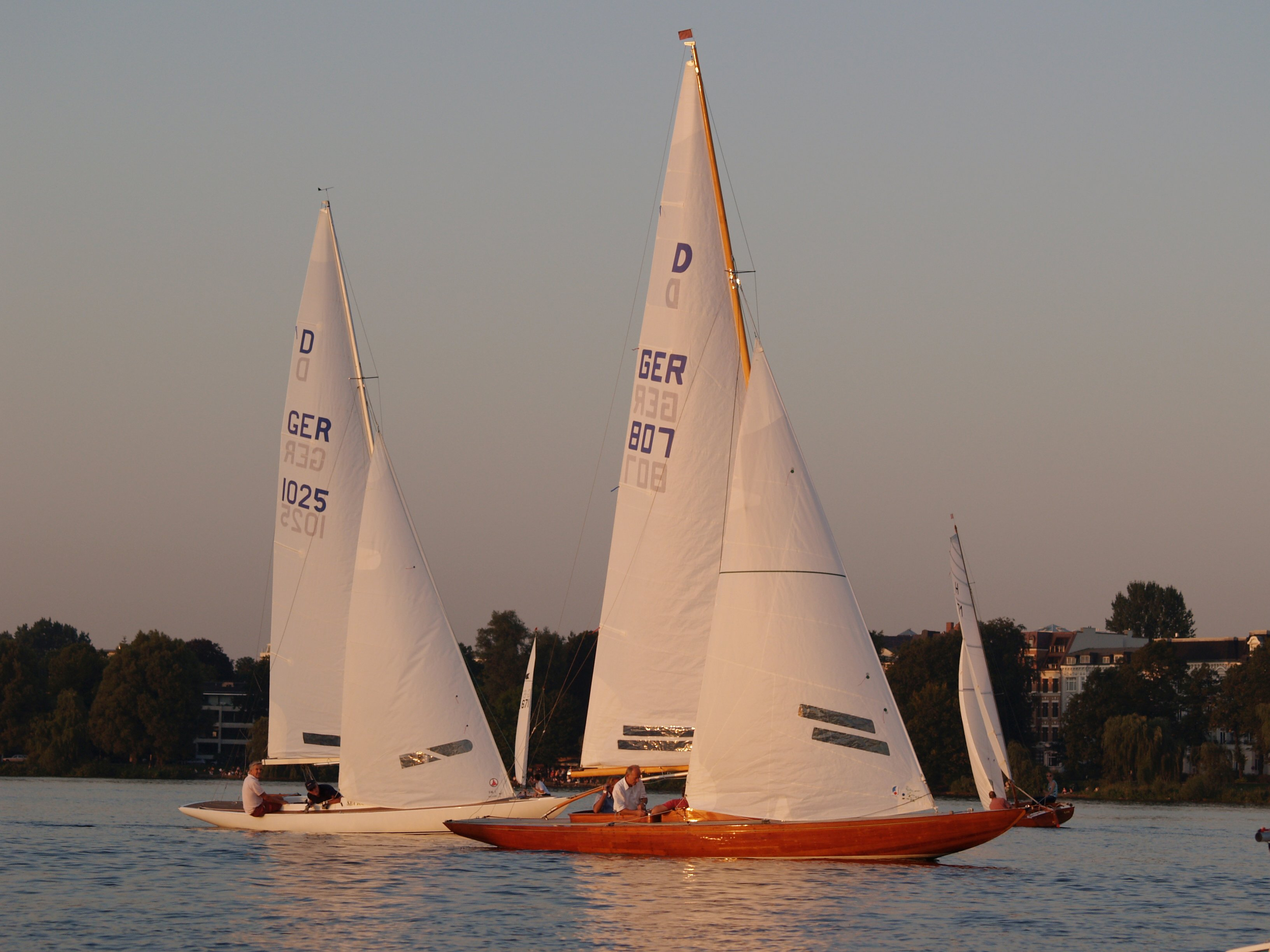 Drachen auf der Alster (Hamburg).